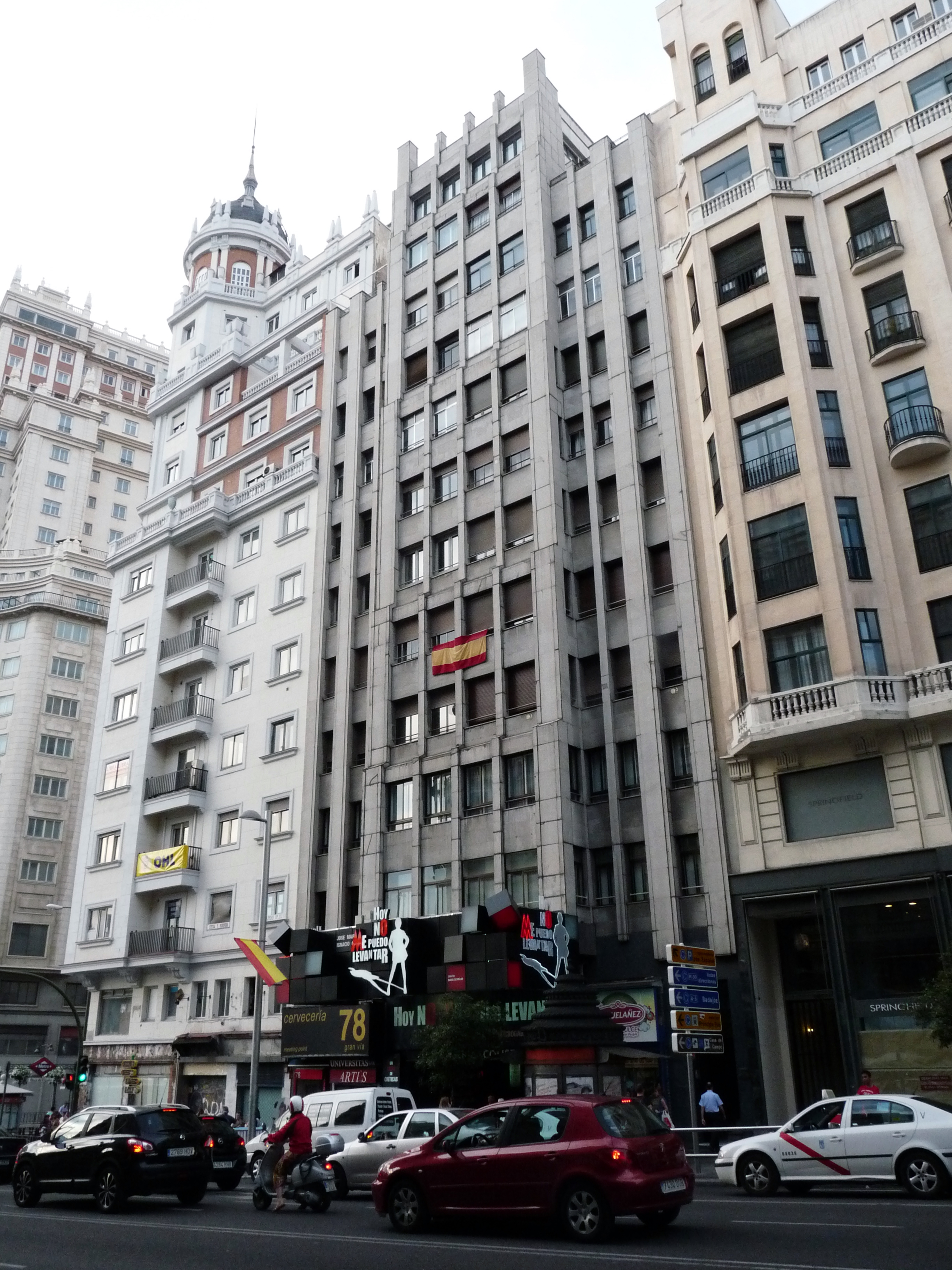 Gran Vía 78, Edificio Coliseum, Gran Vía, Madrid, España.